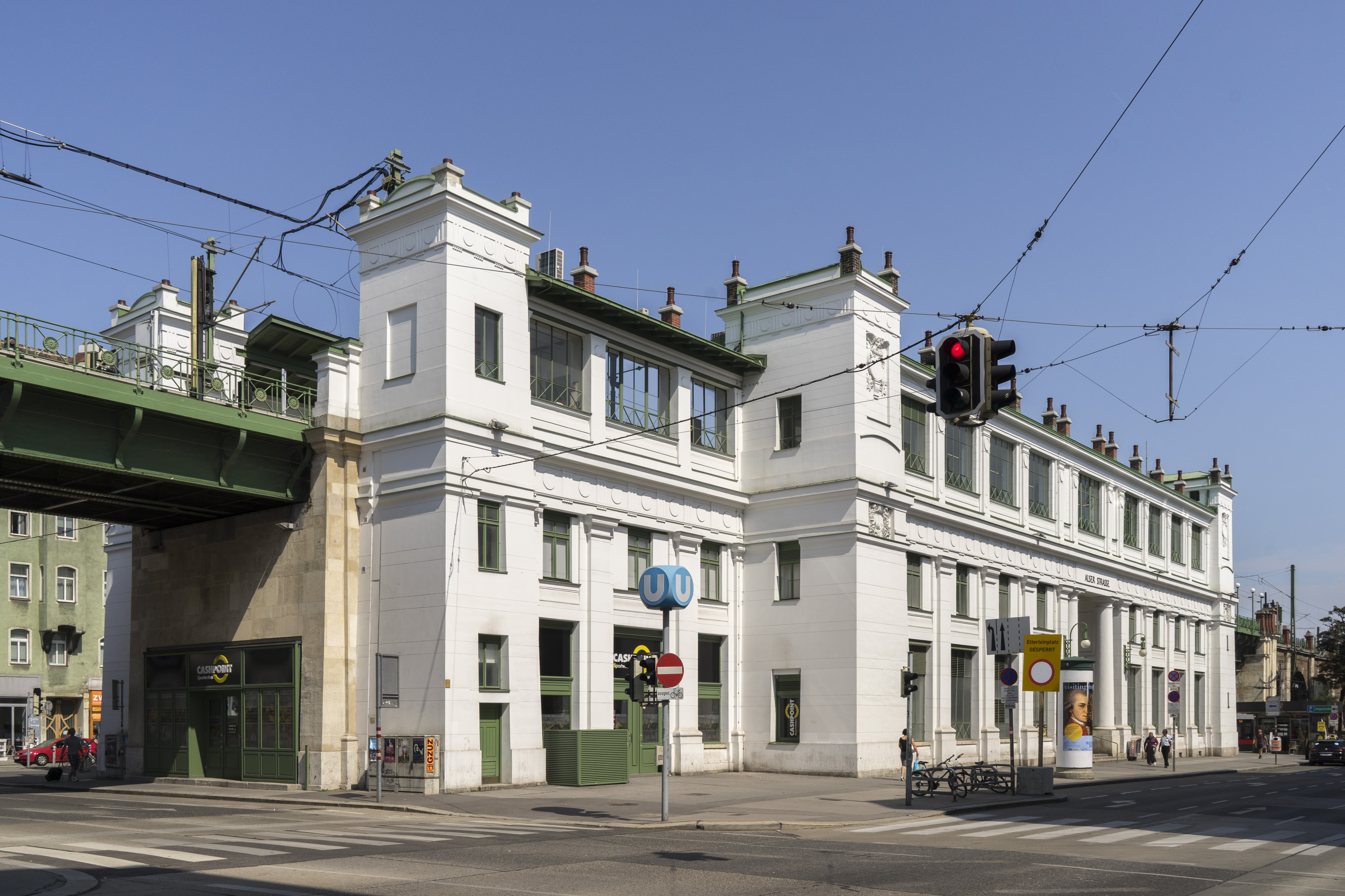 Ubahn-Station Alser Straße